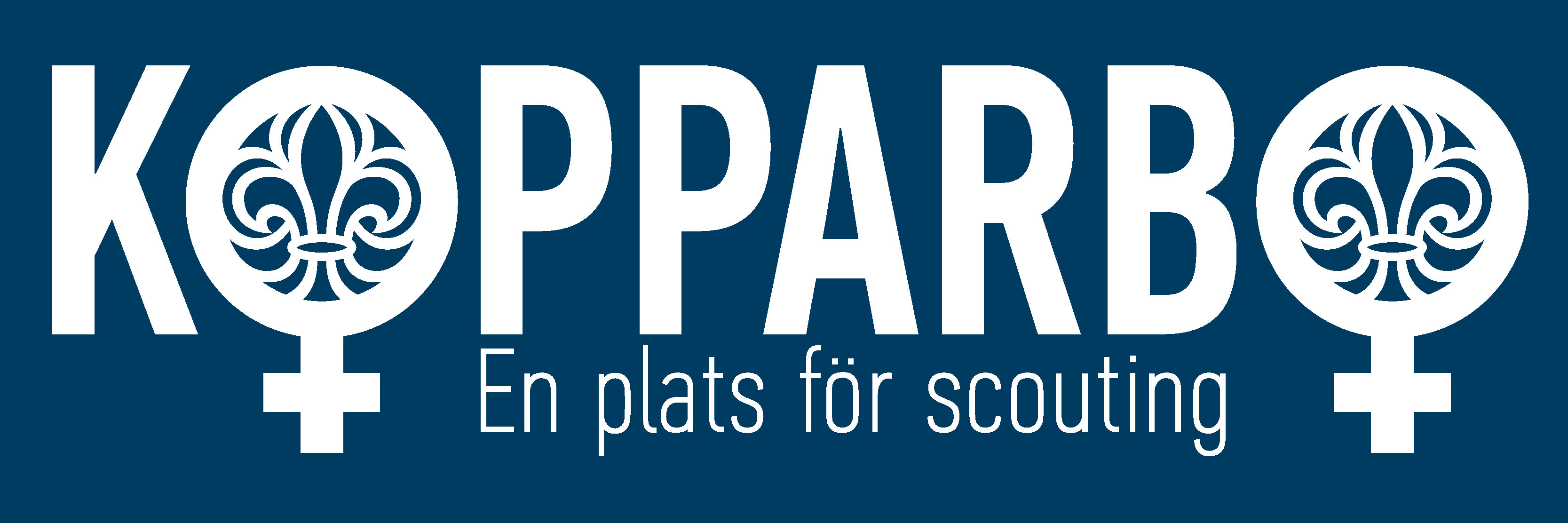 Kopparbos logga